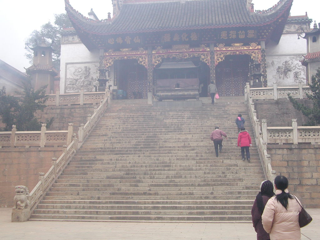 中文（中国大陆）: 陶公庙大殿